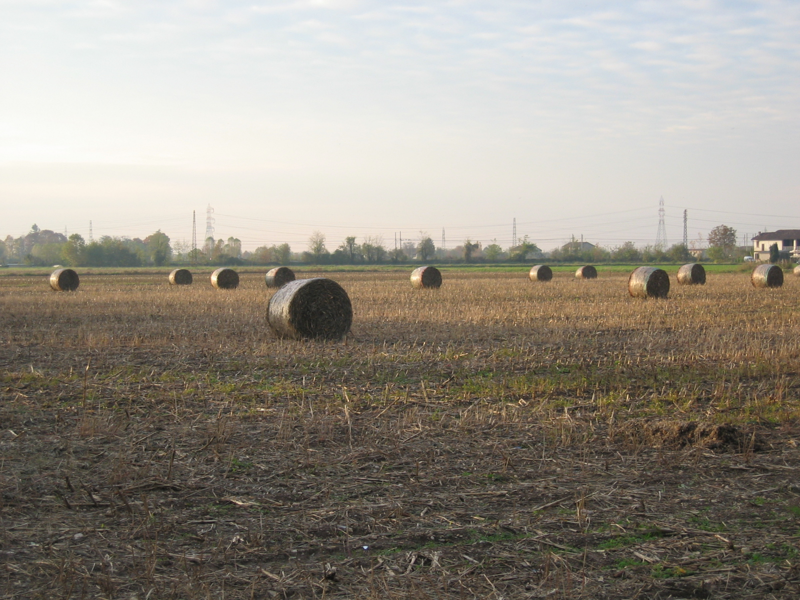 La campagna trevigliese a sud delle Battaglie.